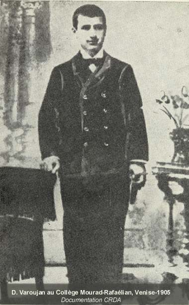 D. Varoujan au College Mourad-Rafaelian, Venise - 1905 Dcumentation CRDA